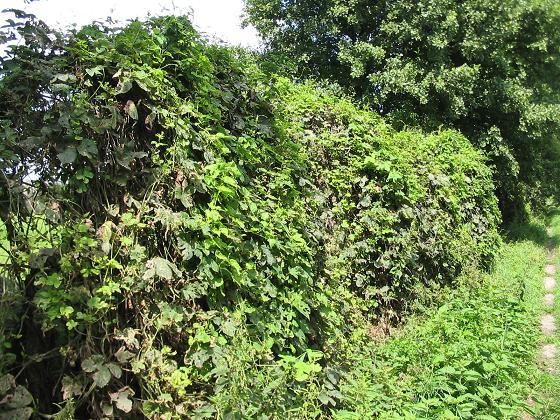 Hecke am Pfefferfließ, Bild 2, Stangenhagen, Brandenburg Naturpark Nuthe-Nieplitz